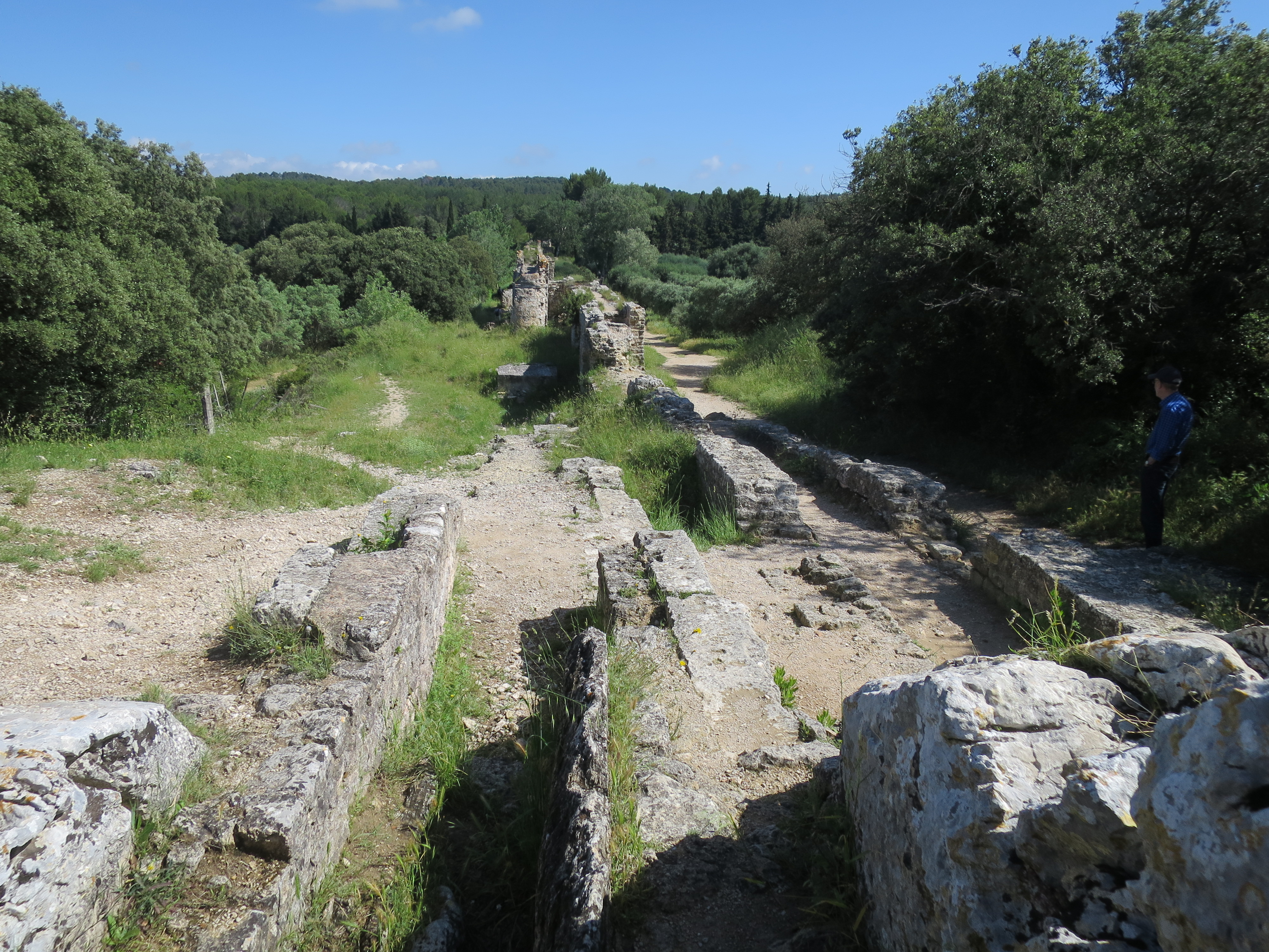 Aquädukt Alpilles—Arles bei der römischen Mühle von Barbegal: Links die Leitung nach Arles, rechts die Leitung zu den Mühlen